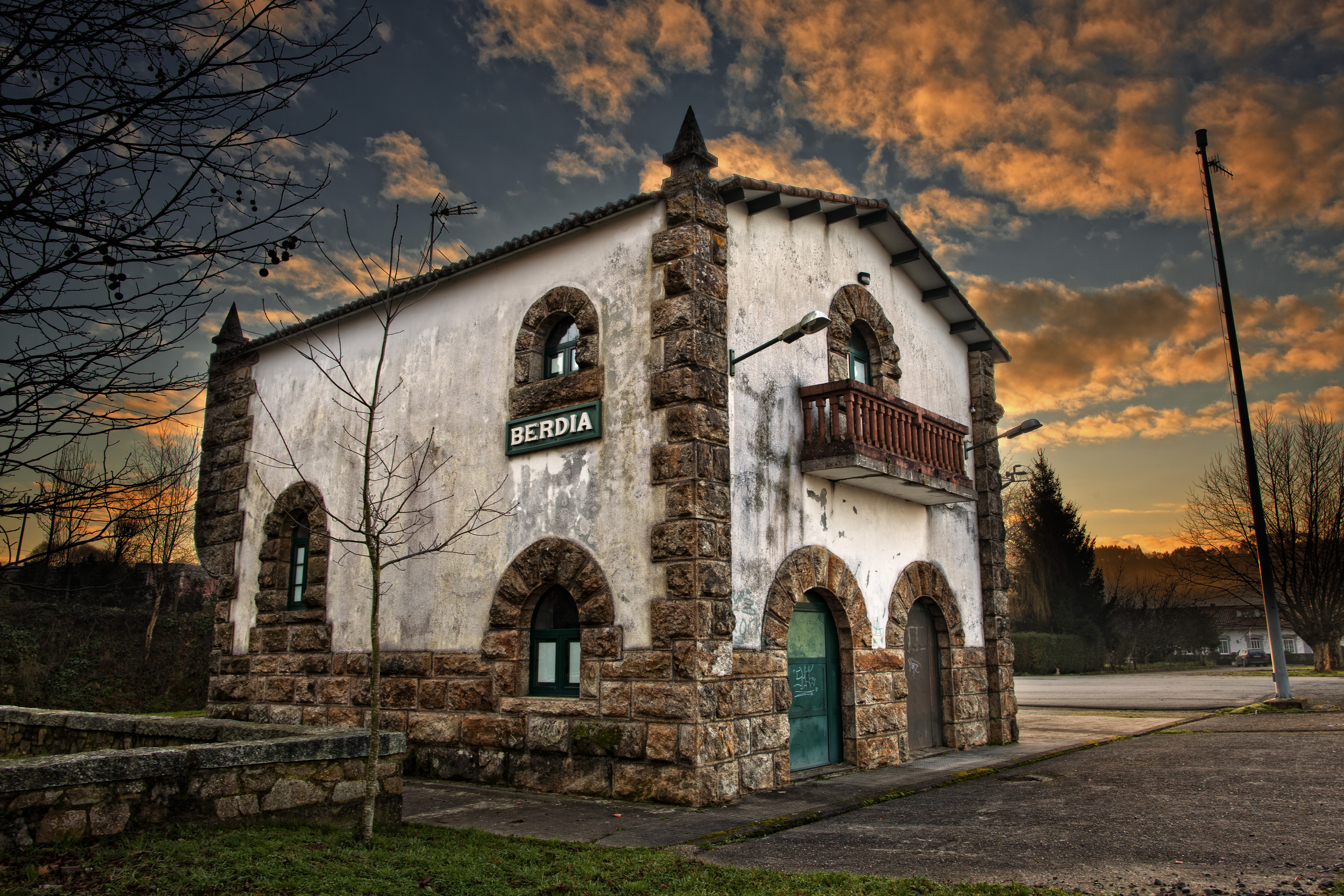 Estación de Verdía, Santiago de Compostela.